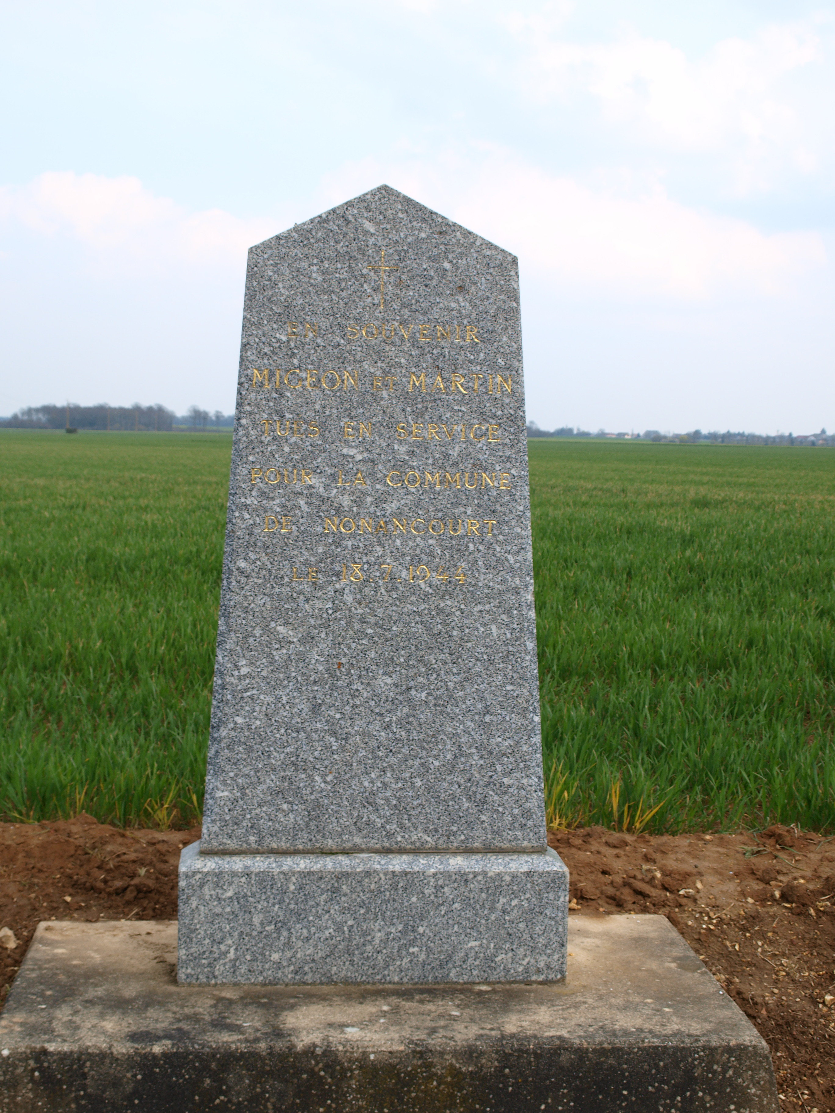 Chavigny-Bailleul (Eure, France) , le hameau des Ardennes.